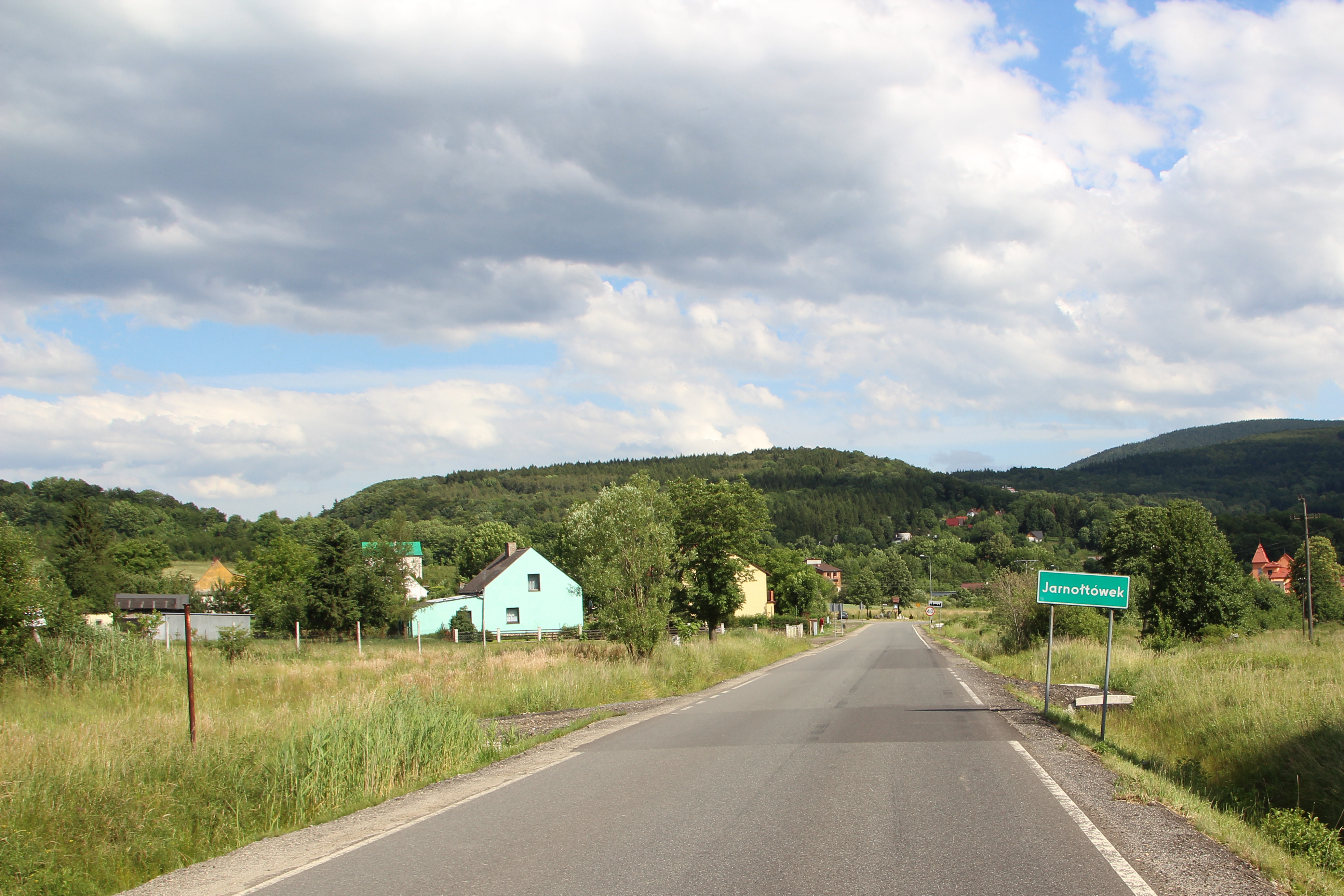 Jarnołtówek - wieś w Polsce w województwie opolskim, w powiecie nyskim w gminie Głuchołazy.